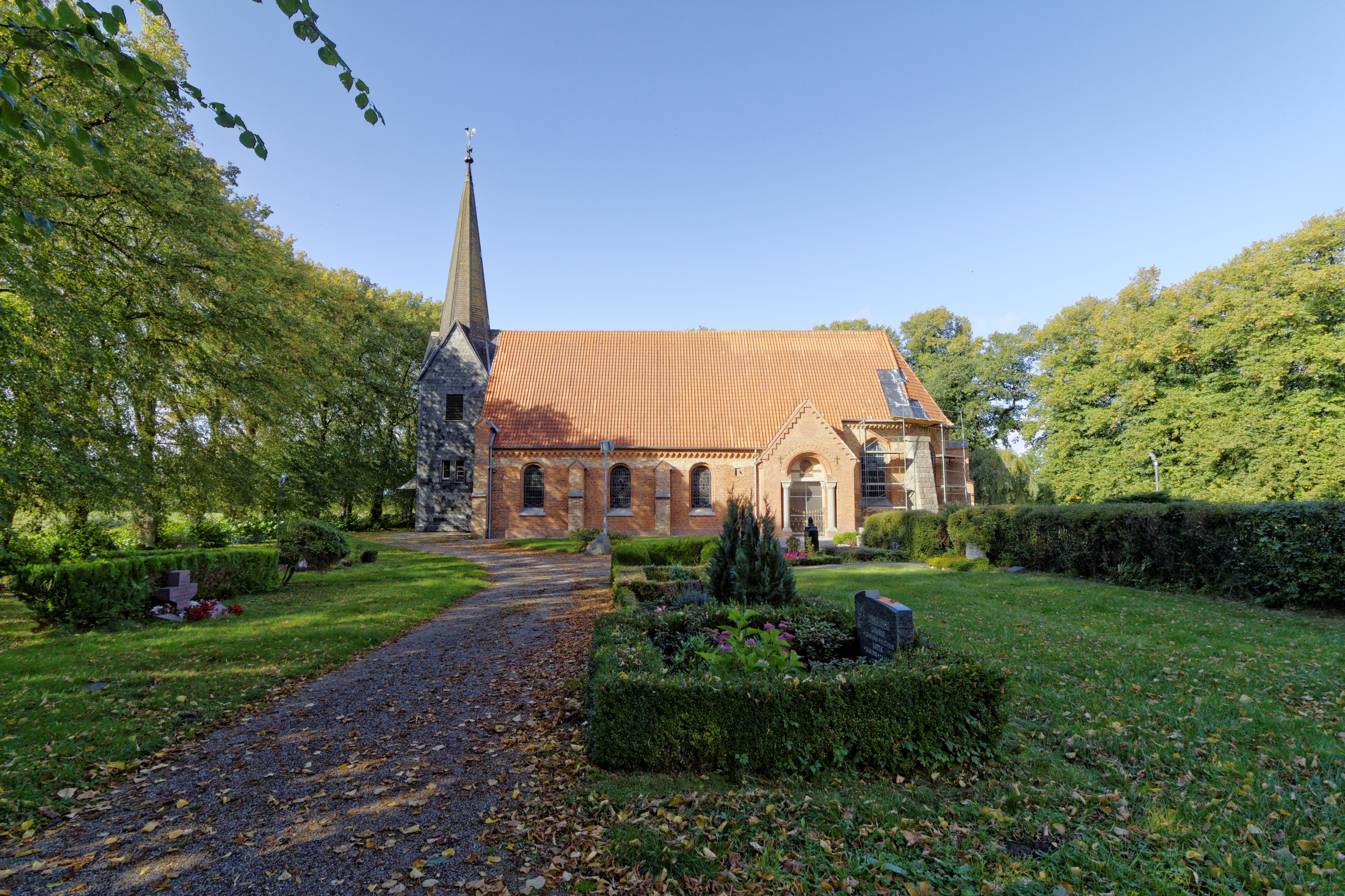 Hütten-Oberhütten, Kirche